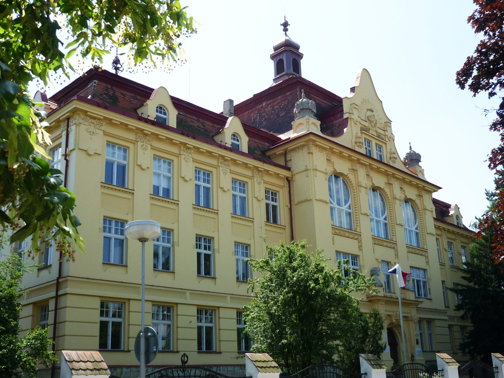 Gymnasium Saaz (Žatec). Architekt: Ernst Schäfer (1903).